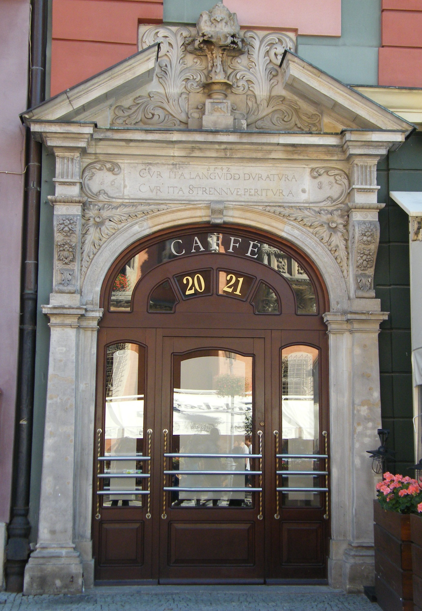 Wrocław, kamienica, XVI, XVII, po 1945